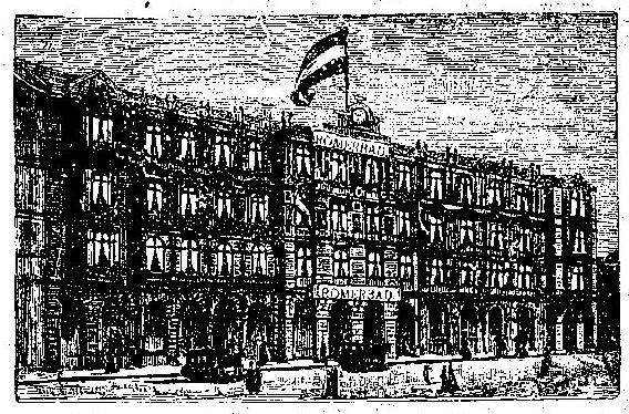 Ansicht des Hotel "Römerbad" in Berlin, Verlängerte Zimmerstr. 4-5, 1890.